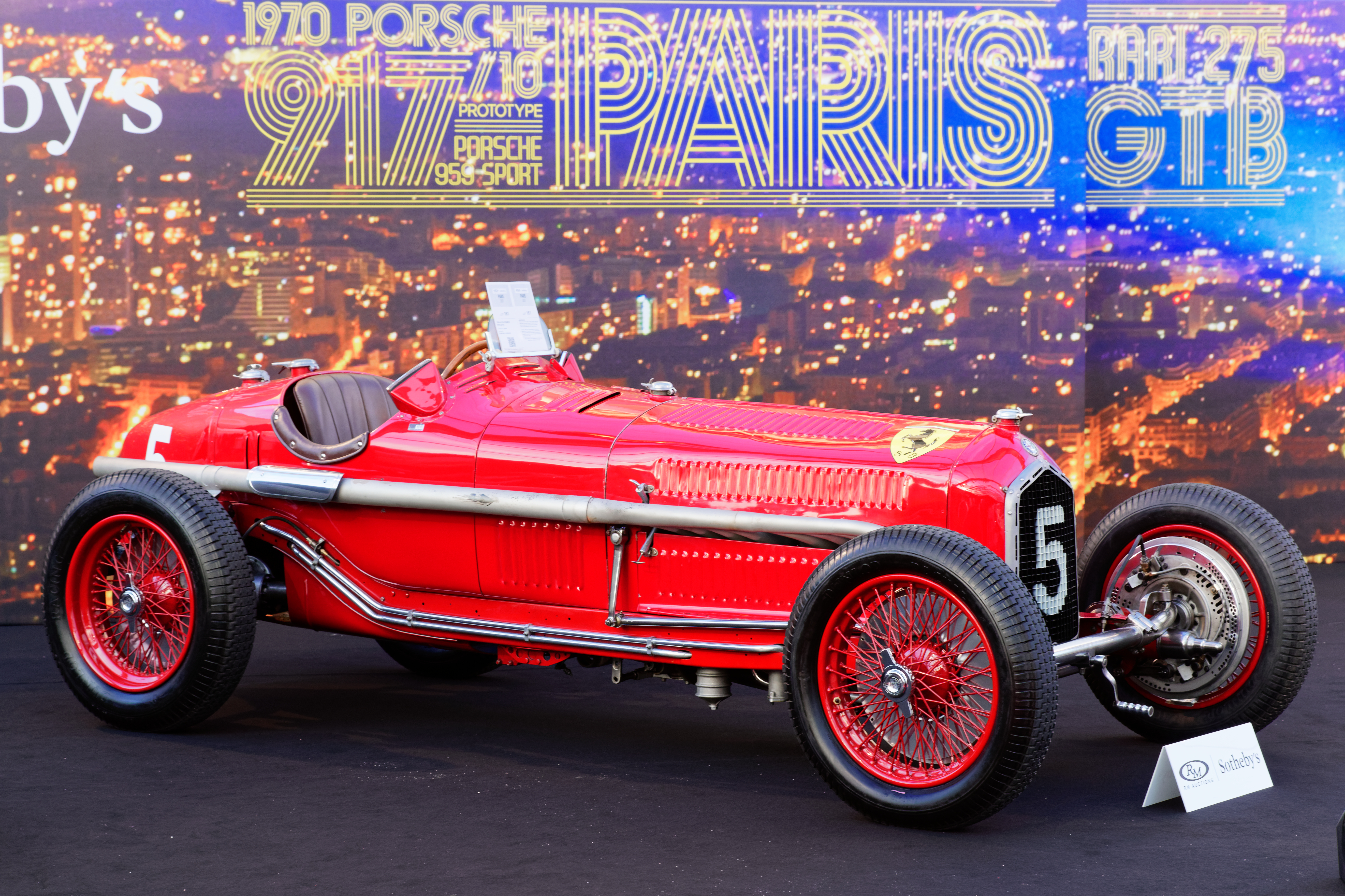 Une Alfa Romeo Tipo B P3 de 1934 exposée lors de la vente RM Sotheby’s 2017 aux Invalides à Paris.